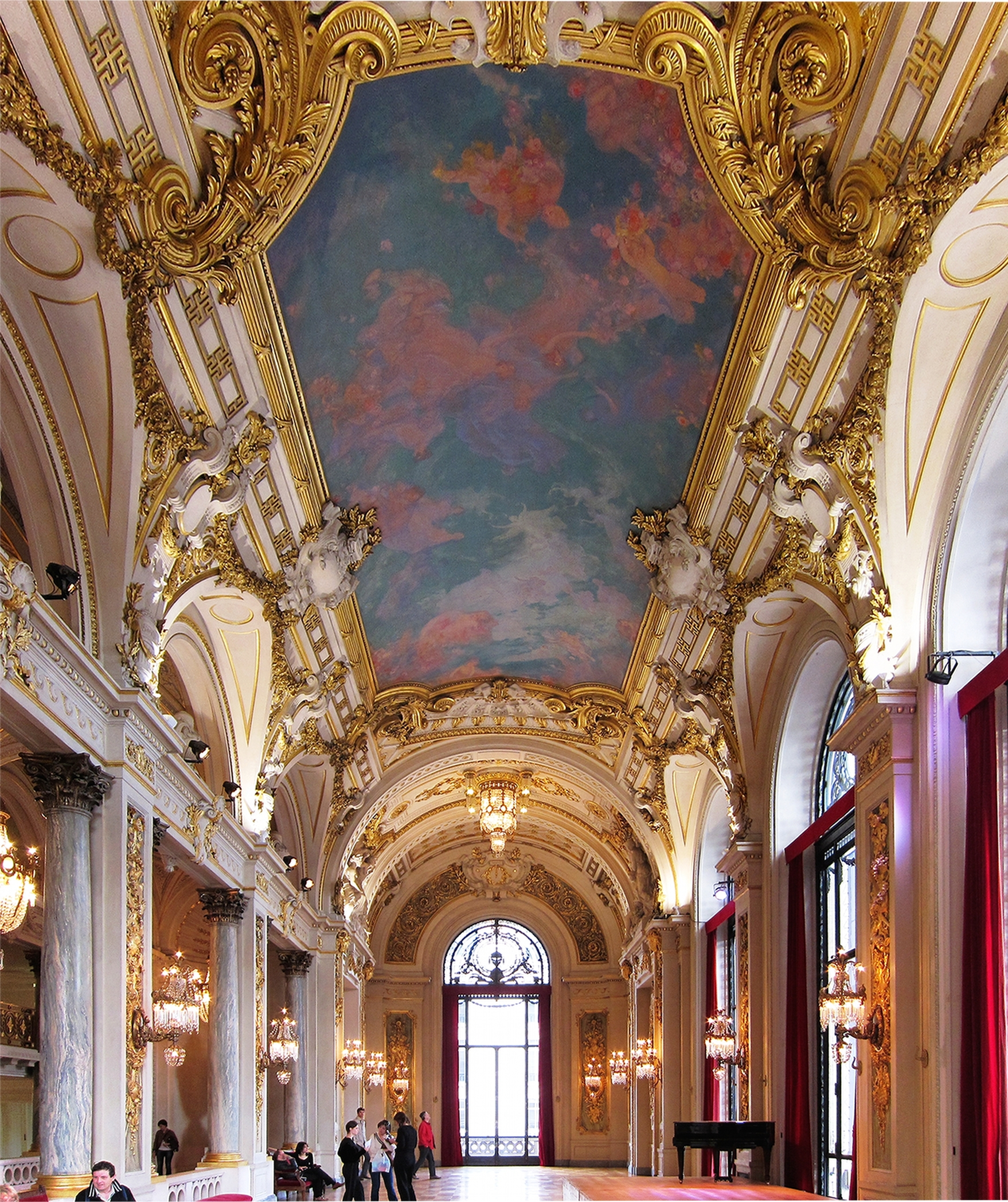 Le hall de l'Opéra de Lille.